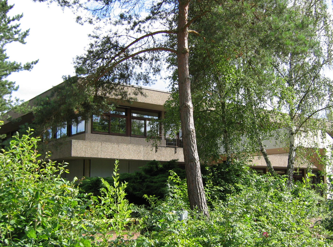 Justus-Liebig-Universität Gießen - Philosophikum II, Haus F (Zweigbibliothek im Philosophikum II)